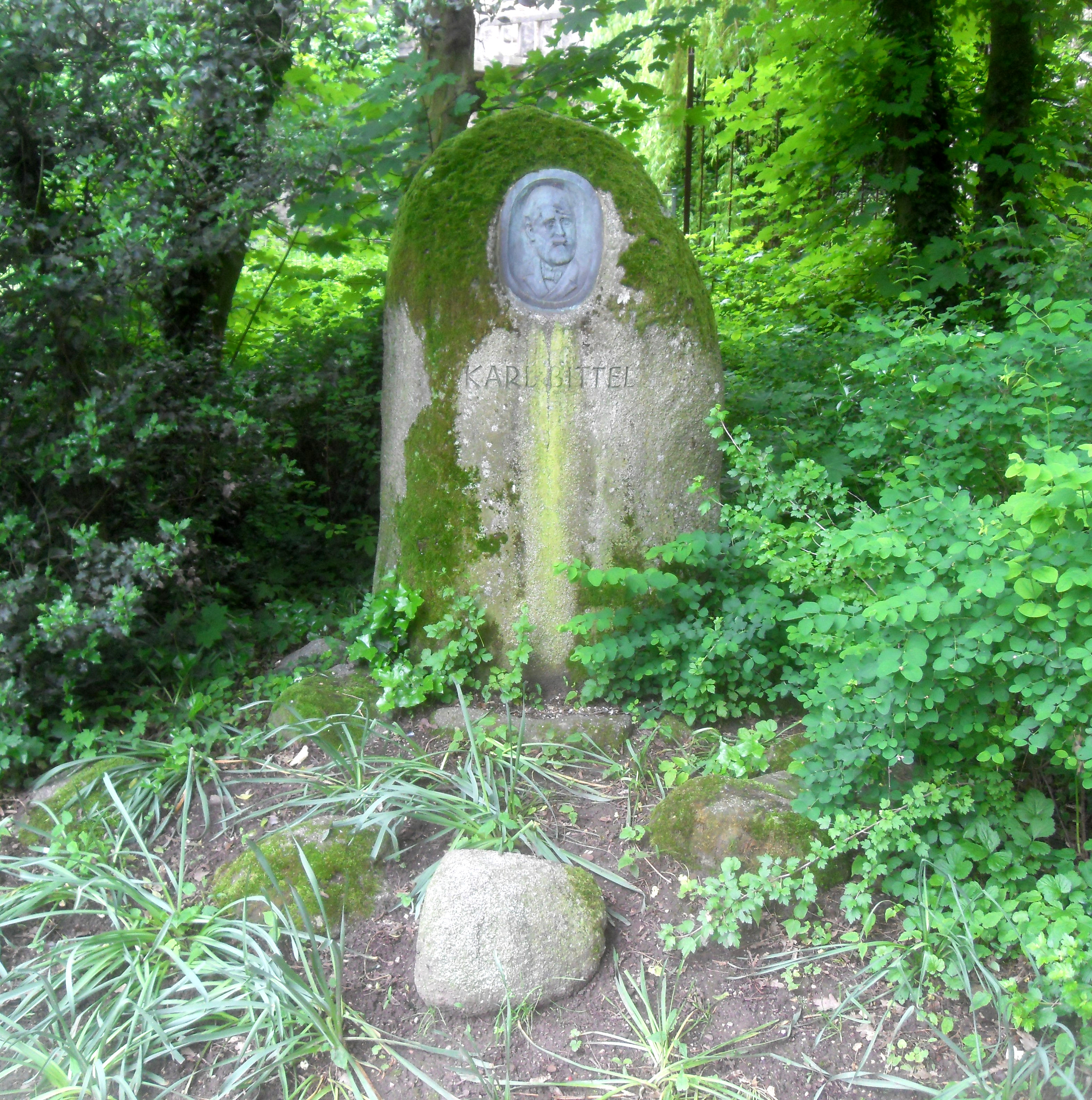 Durch Pläne von Karl Völzing schuf Karl Bittel (1841–1911) mittels des Gärtners Ignatz Racing den heutigen Karl-Bittel-Park mit damals wenigen Bäumen und zwei Brücken. Zu Ehren Bittels erbaute die Stadt Worms 1911 den Bittelstein und benannte 1932 den heutigen Karl-Bittel-Park nach seinem Namen.